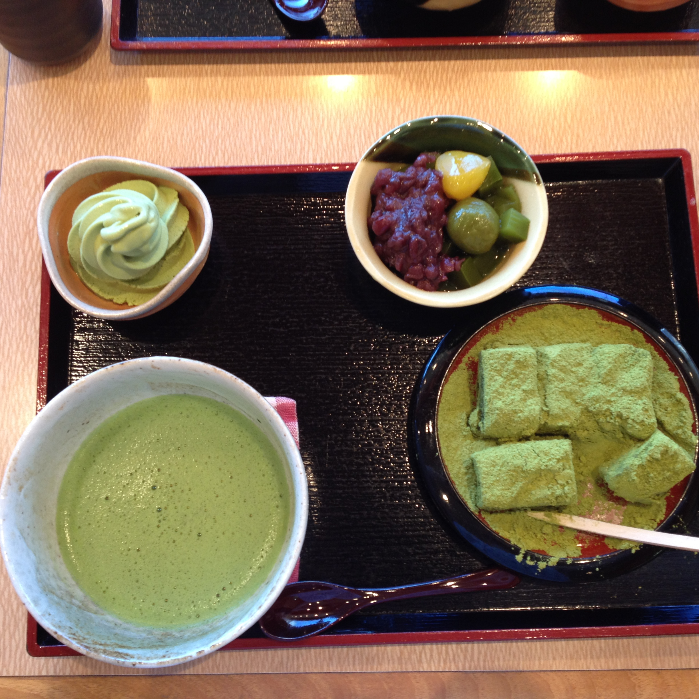 Verda teo en diversa formo por manĝi; kiel teo por trinki, kiel glaciaĵo, kiel dolĉaĵo. Ege bongusta! :)